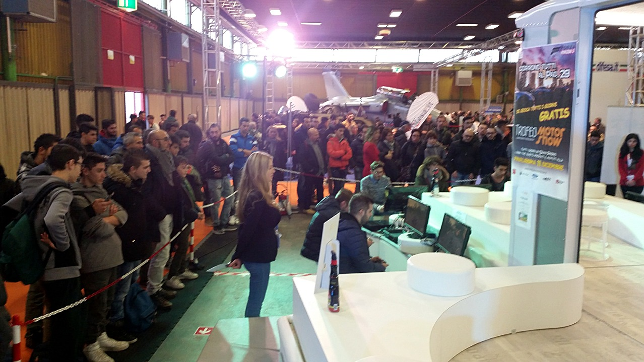 Le finali del Trofeo si svolgono in Fiera di Bologna a dicembre durante il Motor Show. Accedono i primi tre classificati dei vari Gran Premi itineranti che si svolgono in tutta Italia in fiere, centri commerciali e location dedicate.